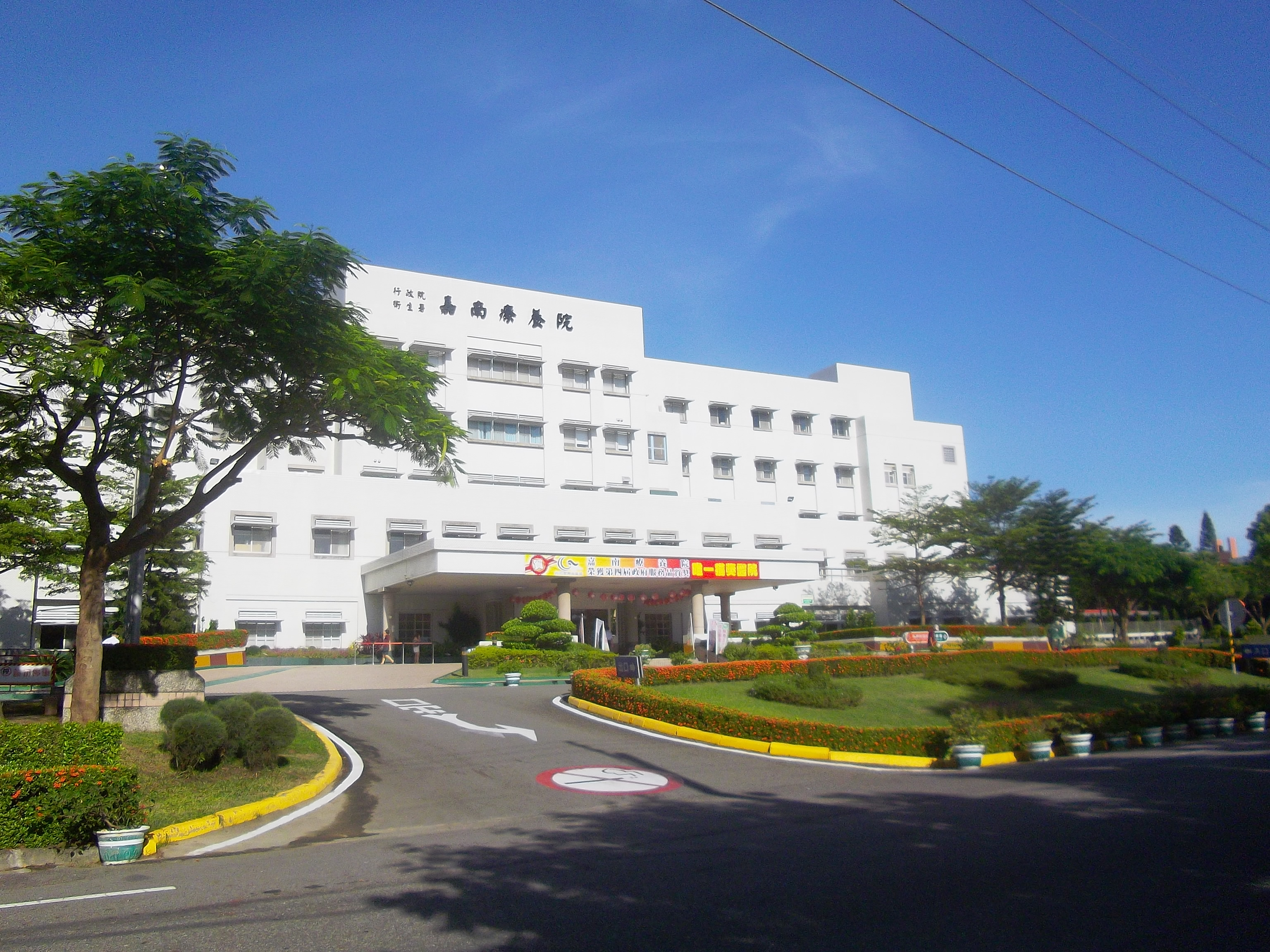 行政院衛生署嘉南療養院。